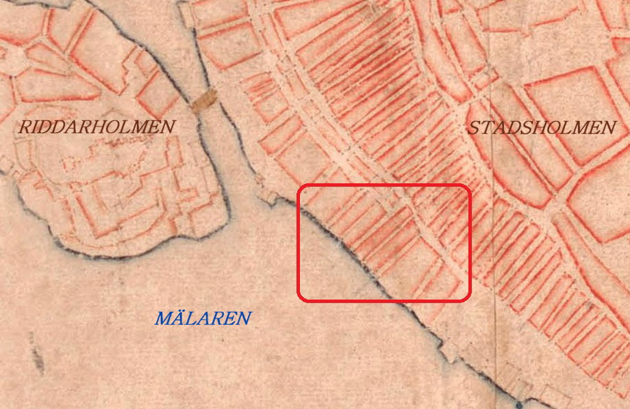 Stockholms äldsta karta visar staden före 1547, ritad på 1620-talet. Detalj som visar läget för kvarteret Daedalus.